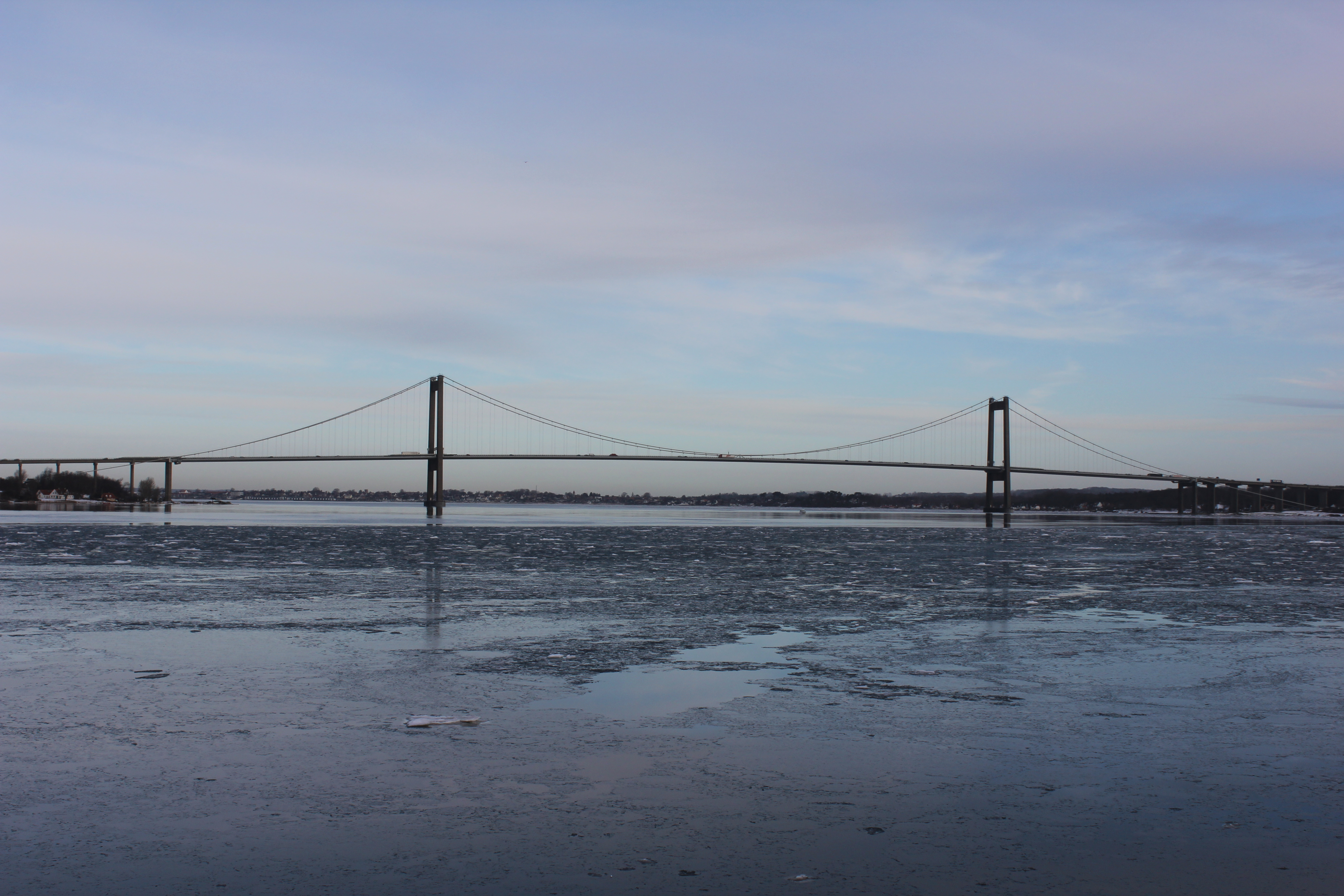 Ny Lillebæltsbro fotograferet fra Middelfart (Syd). 2011